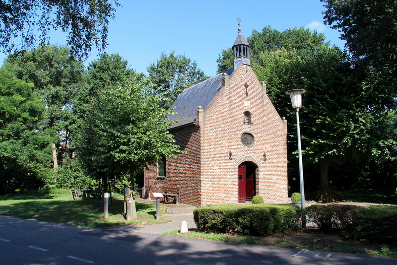 Omgeven door eeuwenoude linden staat aan de rand van het Leudal de kapel van Onze Lieve Vrouwe in 't Sant. De kapel stamt uit 1711 zoals de gevelsteen vermeldt. In de nis boven de ingang staat een kopie van een Mariabeeldje dat zeker vierhonderd jaar oud is. Het originele beeldje bevindt zich in de Sint-Martinuskerk in Neer. In 1928 is de kapel gerestaureerd. De witkalk is van de muren verwijderd en de oude veldovenstenen kwamen te voorschijn. De kapel staat in de volksmond nog steeds bekens als witte kapel.